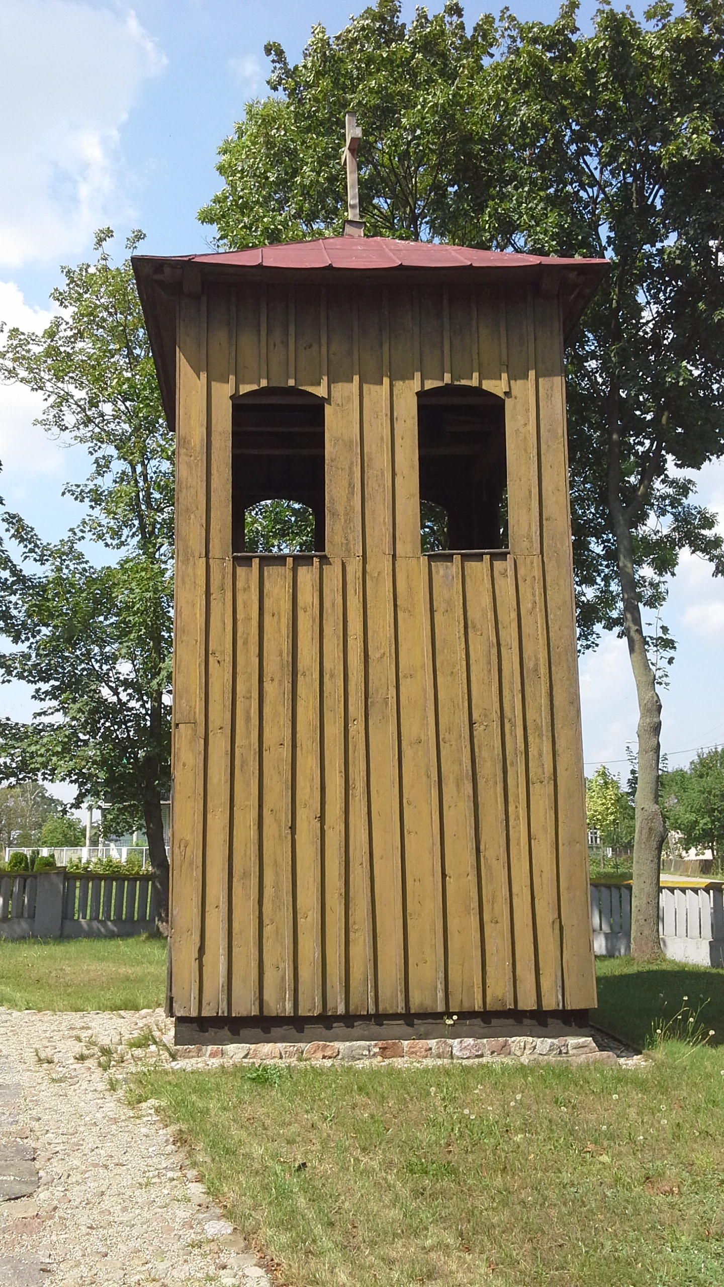 Dzwonnica przy dawnej cerkwi unickiej w Grodzisku